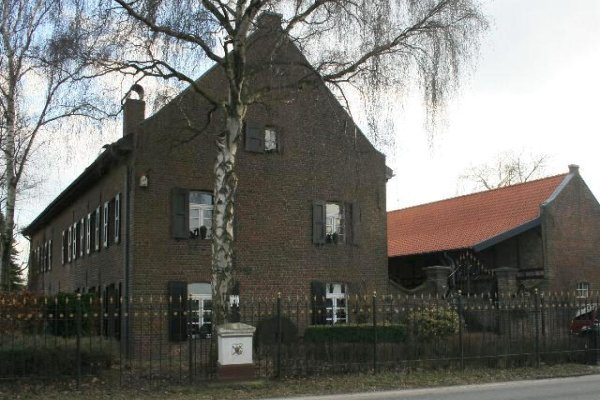 Denkmal Nr. 87 in Heinsberg-Unterbruch